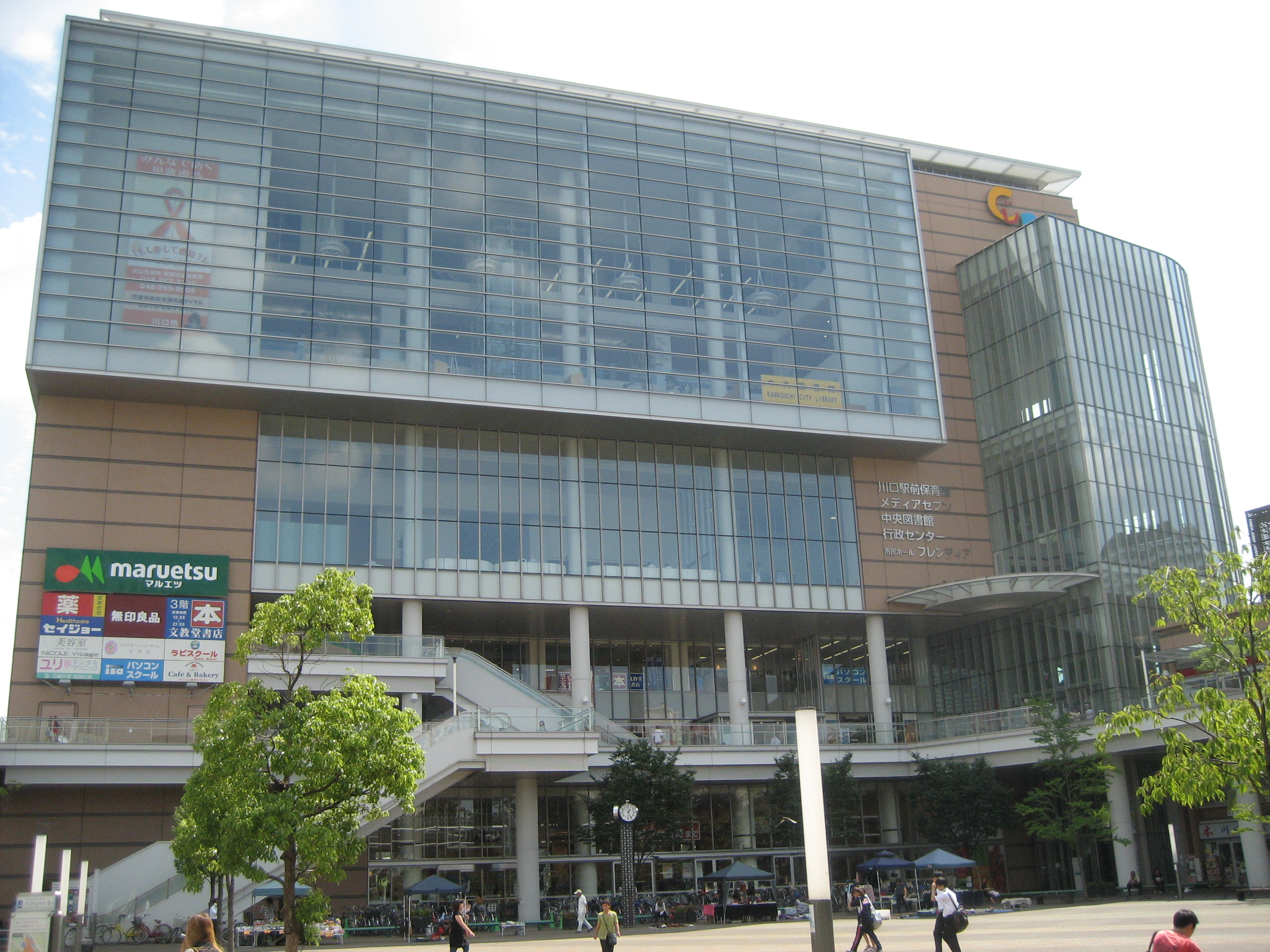 川口市の公共施設キュポラ